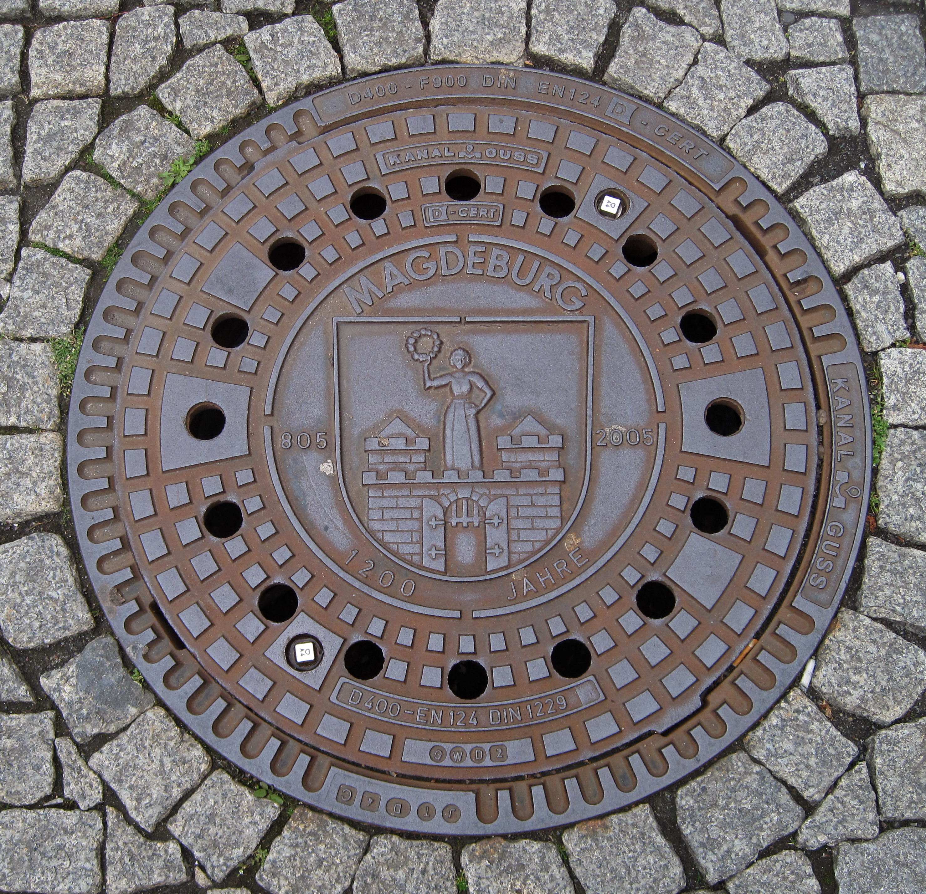 Schachtdeckel 1200 Jahre (805-2005) in Magdeburg, Breiter Weg/Ecke Bärstraße.